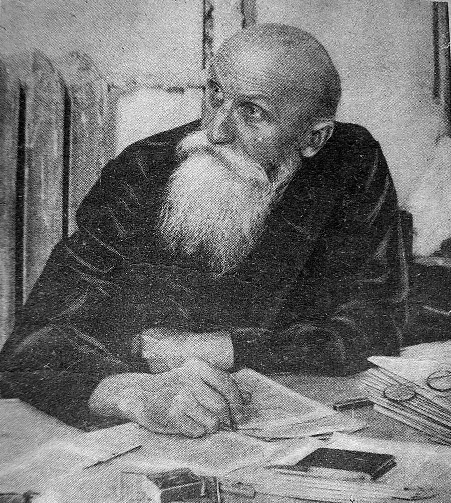 Иван Гаврилович Бухарин, отец Николая Бухарина, советского партийного деятеля. Учитель, надворный советник. Умер в 1940.